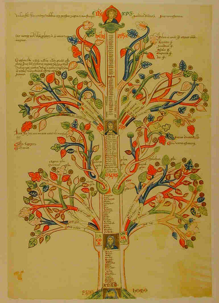 Tabla II del manuscrito "Liber Figurarum", "Libro de las Figuras" del Abad Joaquin de Fiore (1135-1202) con el "Arbol de la Humanidad: De Adán a la Segunda Venida de Jesús Cristo".